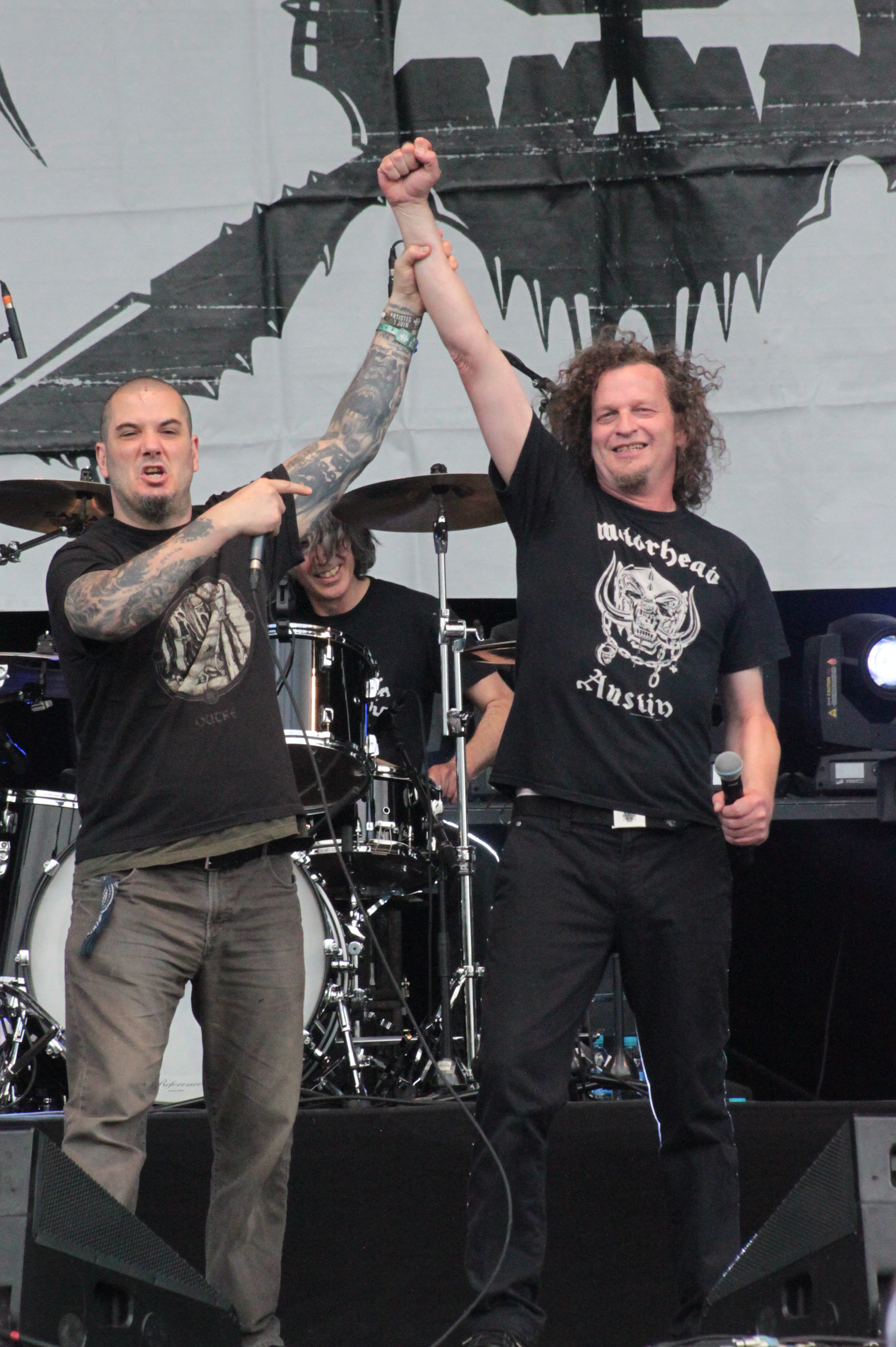 Phil Anselmo (guest), Daniel Mongrain, Voivod, Hellfest 2013, Fr-44-Clisson.